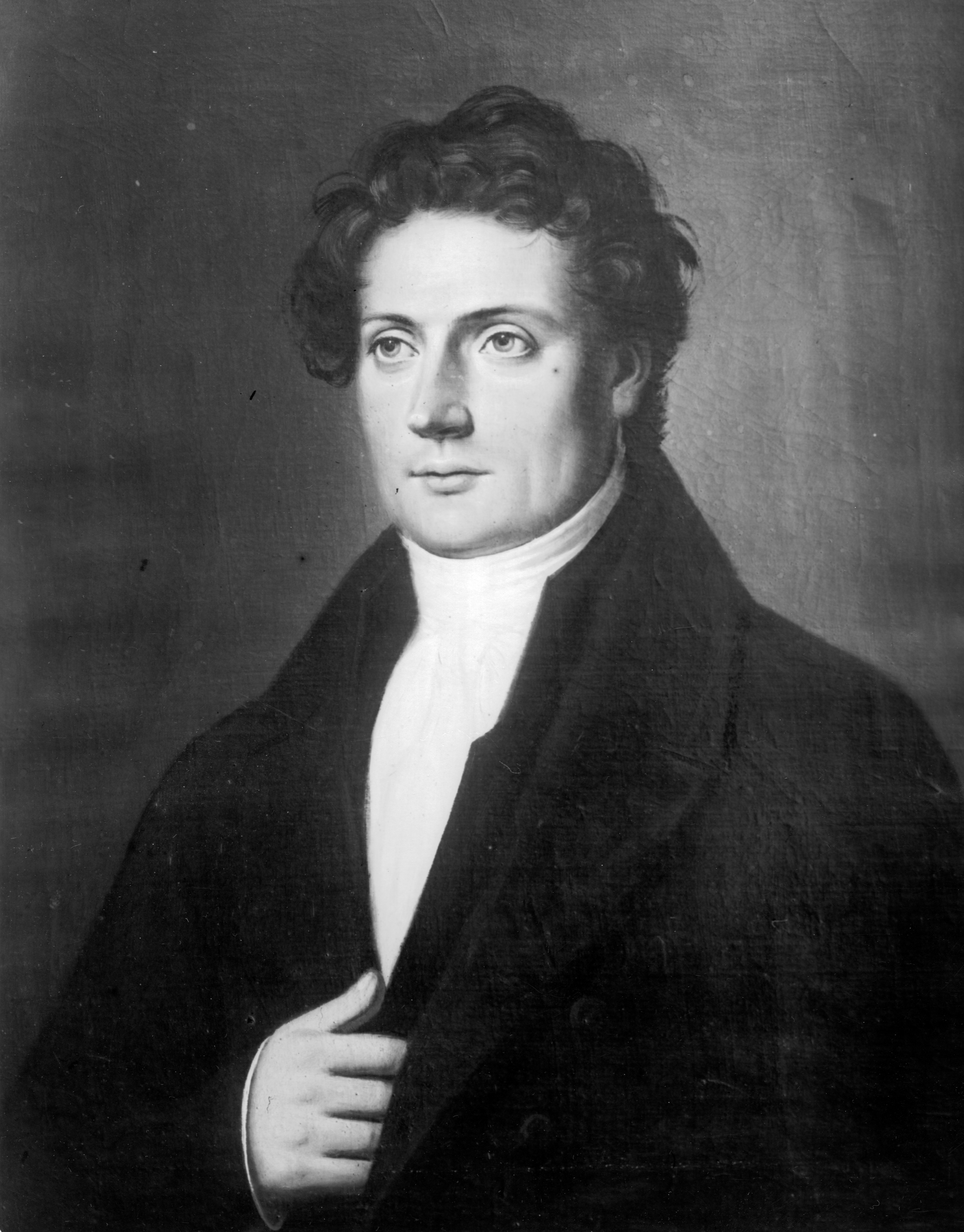 Johan Ludvig Runeberg. Positiv av J.E. Lindhs osignerade oljemålning 1832. Negativ av K. K. Meinander taget 1903. Originalmålningen förstördes i en brand 1906. Signum: slsa1160_335